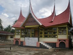 Kantor KAN Tiakar